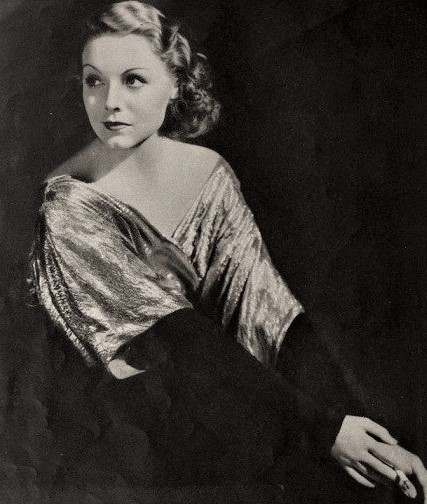 Claire Dodd